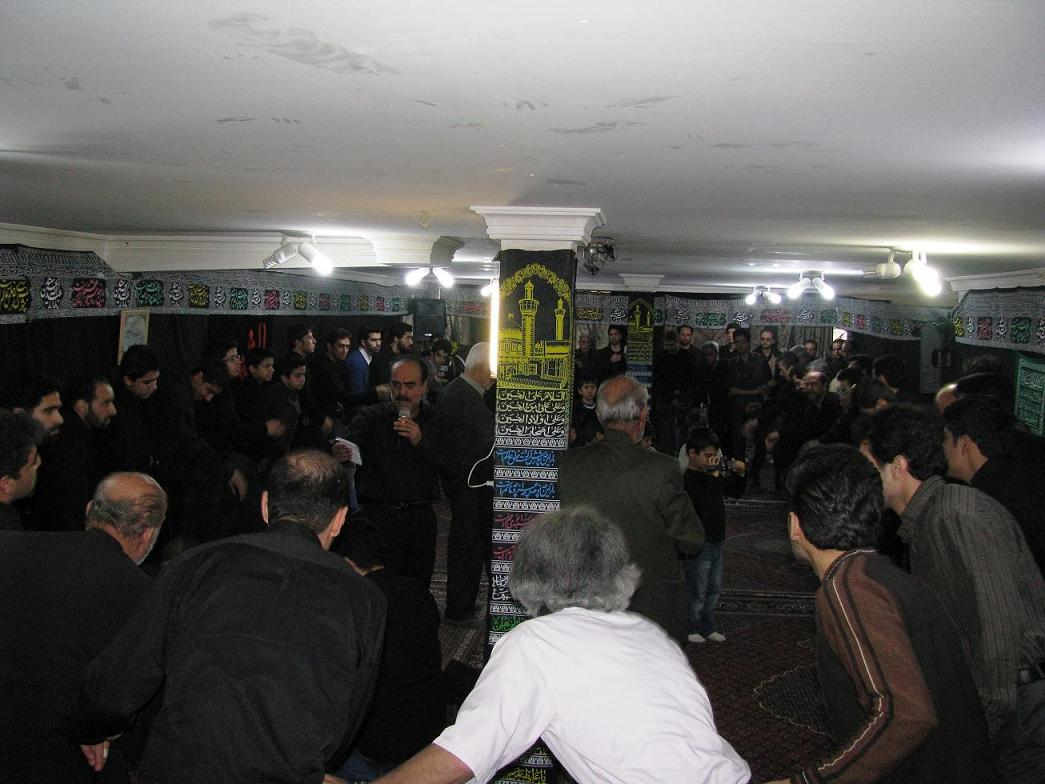 هیئت باریکانیها - محرم 87 - تهران